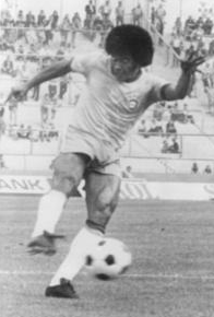 Der brasilianische Nationalspieler Jairzinho bei der WM 1974 im Spiel gegen Zaire.